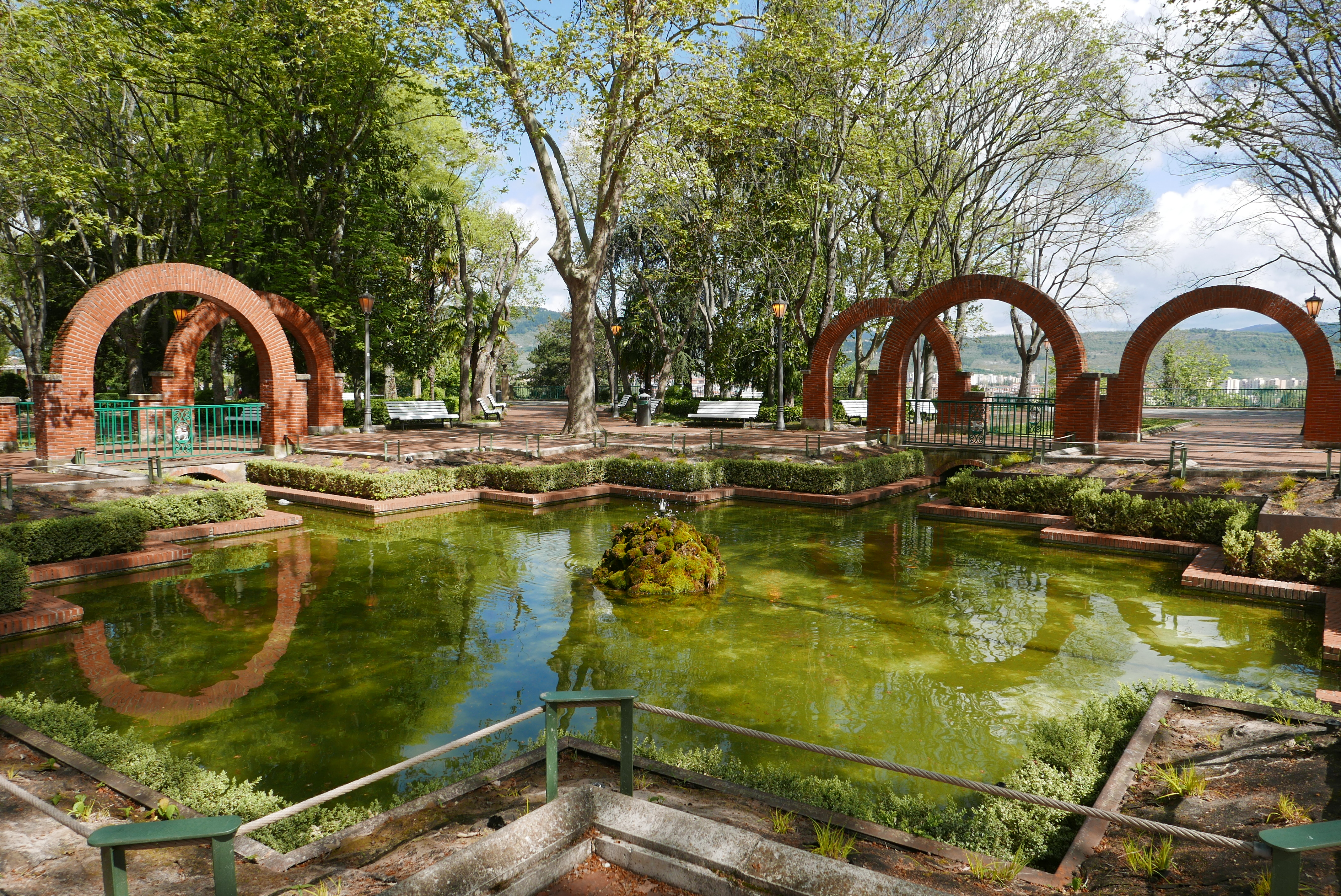 Vista del estanque